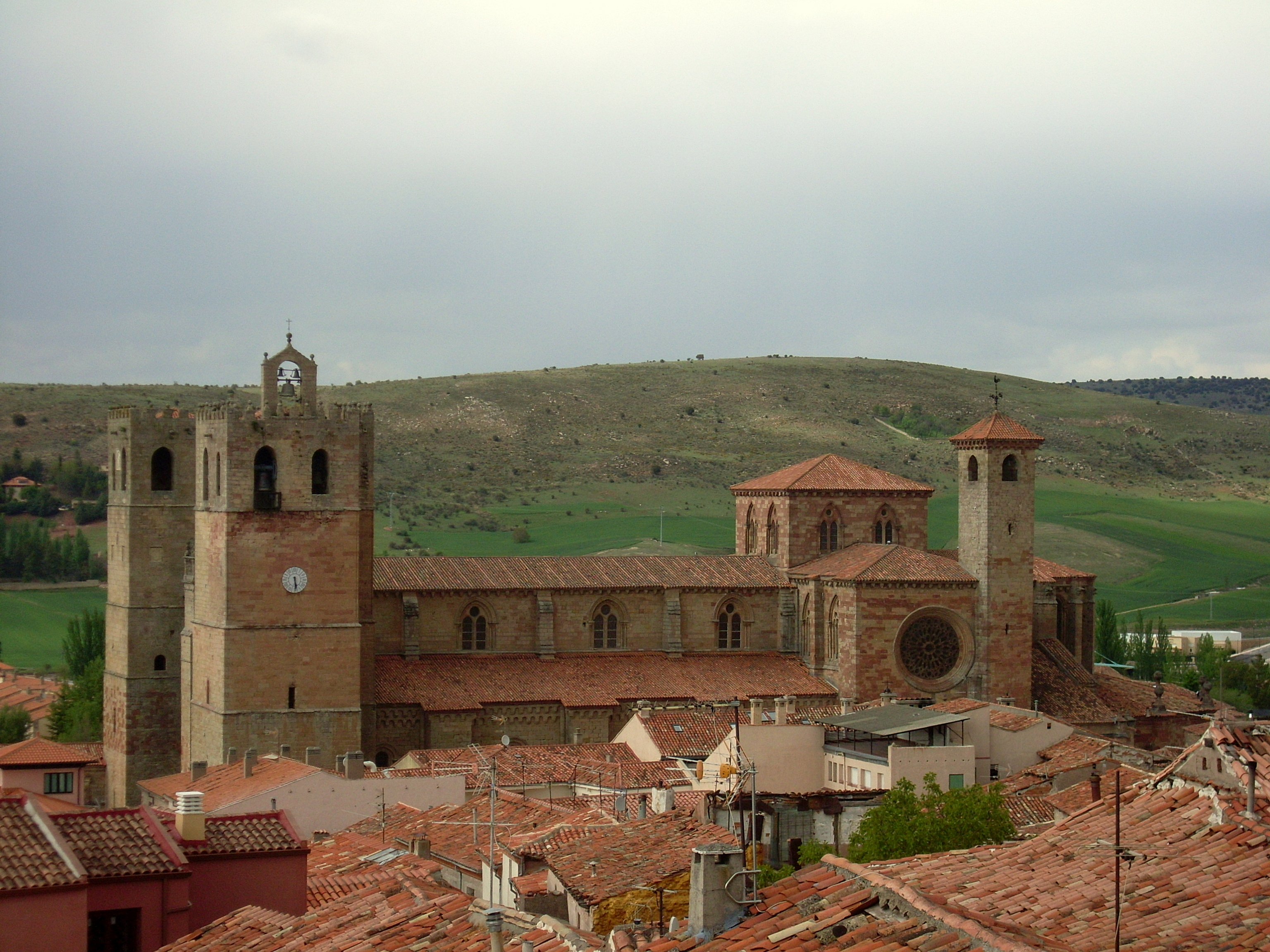 Viaje a Sigüenza, Guadalajara. Catedral desde la Casa del Doncel